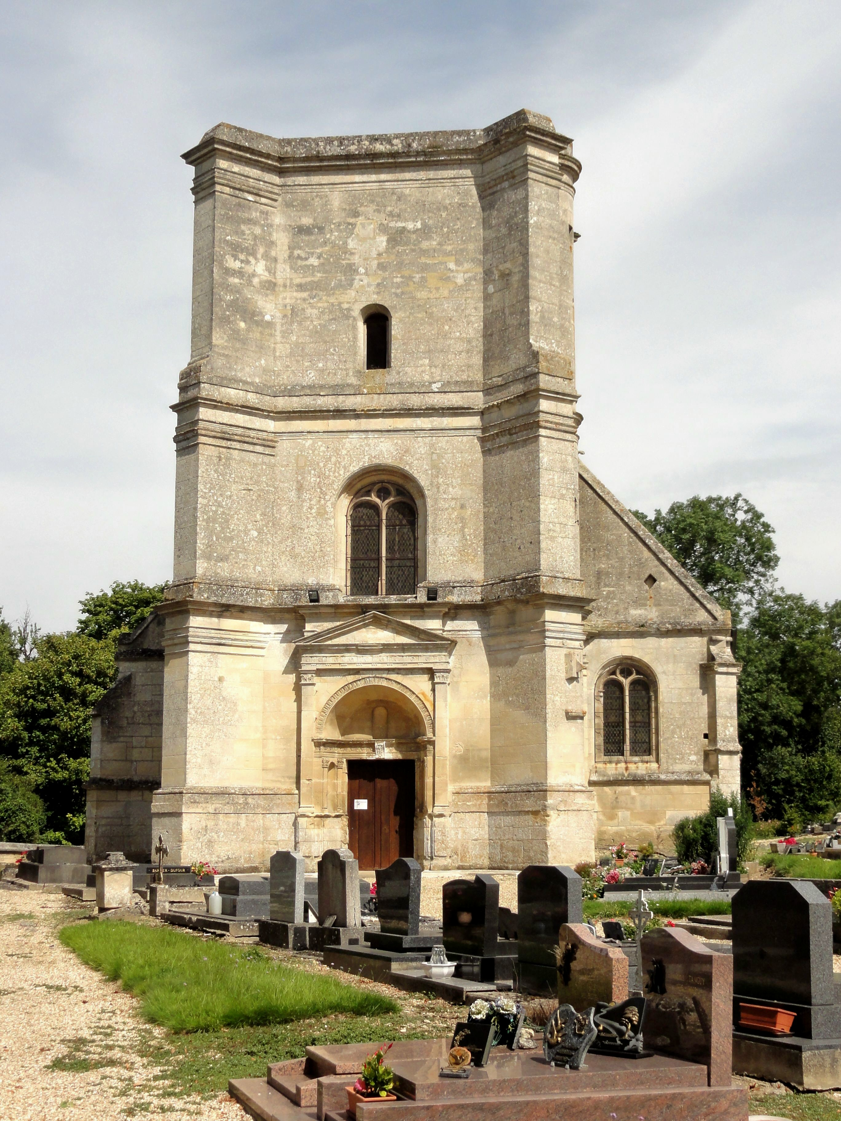 Façade occidentale.